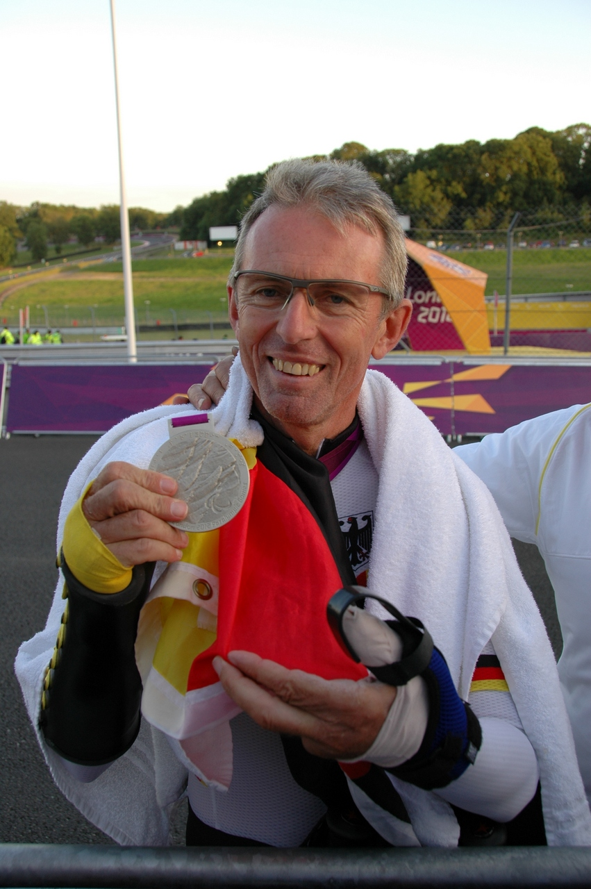 Hans-Peter Durst, Silber-Medaillengewinner Paralympics London 2012